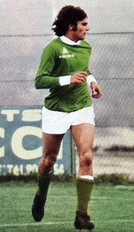 Oswaldo Piazza en 1972, 'Ageducatifs Football 1972 - 1973', Panini figurina n°216.